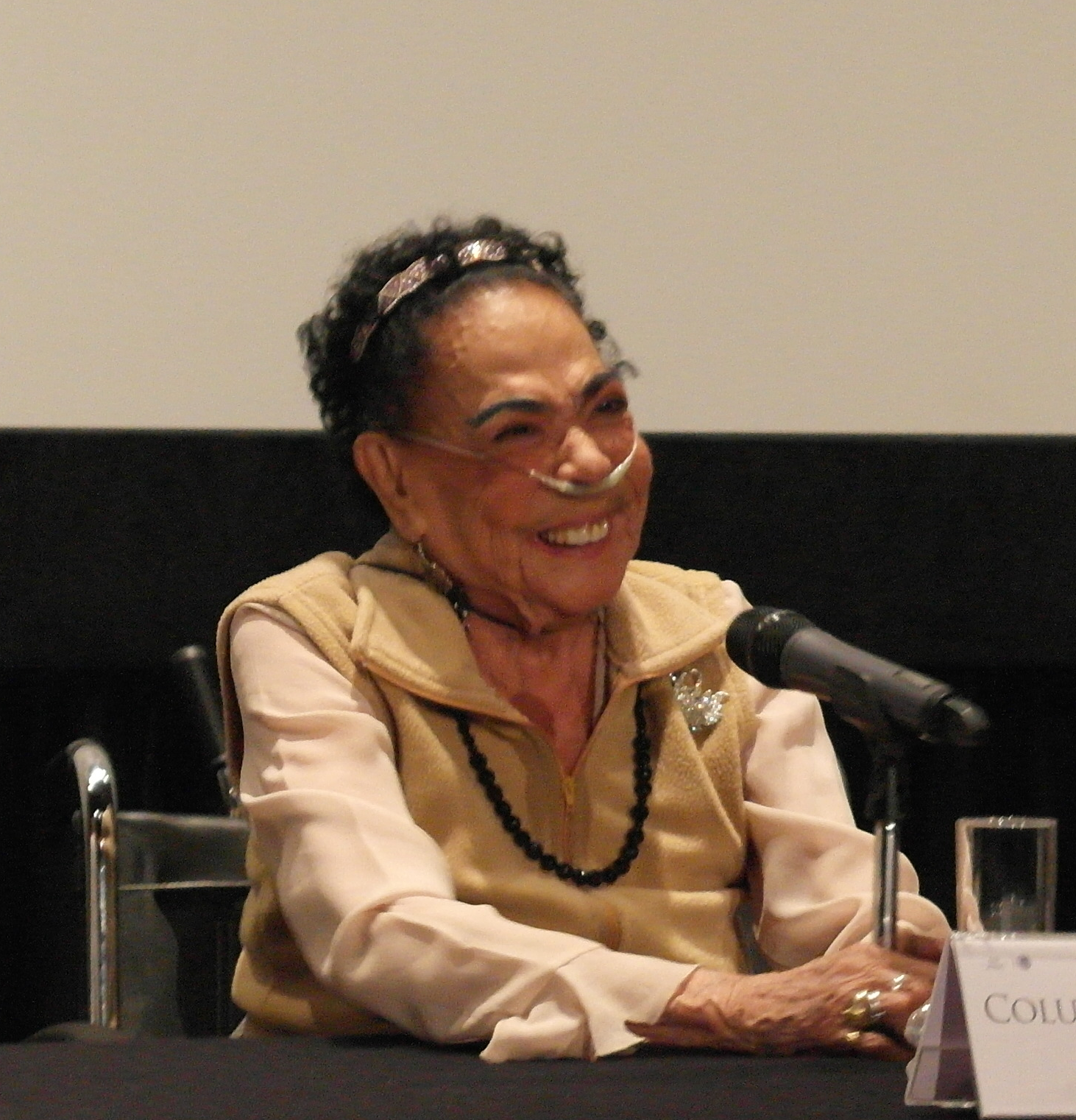 Columba Domínguez, homenaje en la Cineteca Nacional 29/May/2013